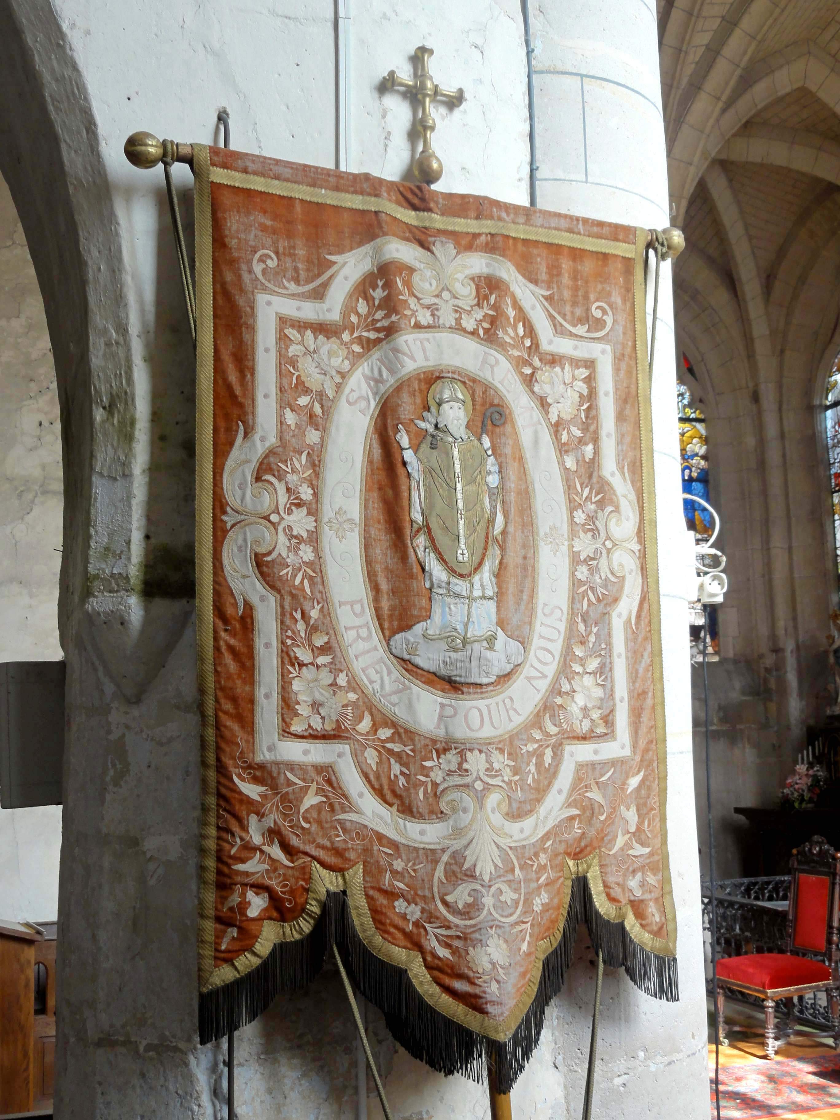 Mobilier de l'église - voir titre.